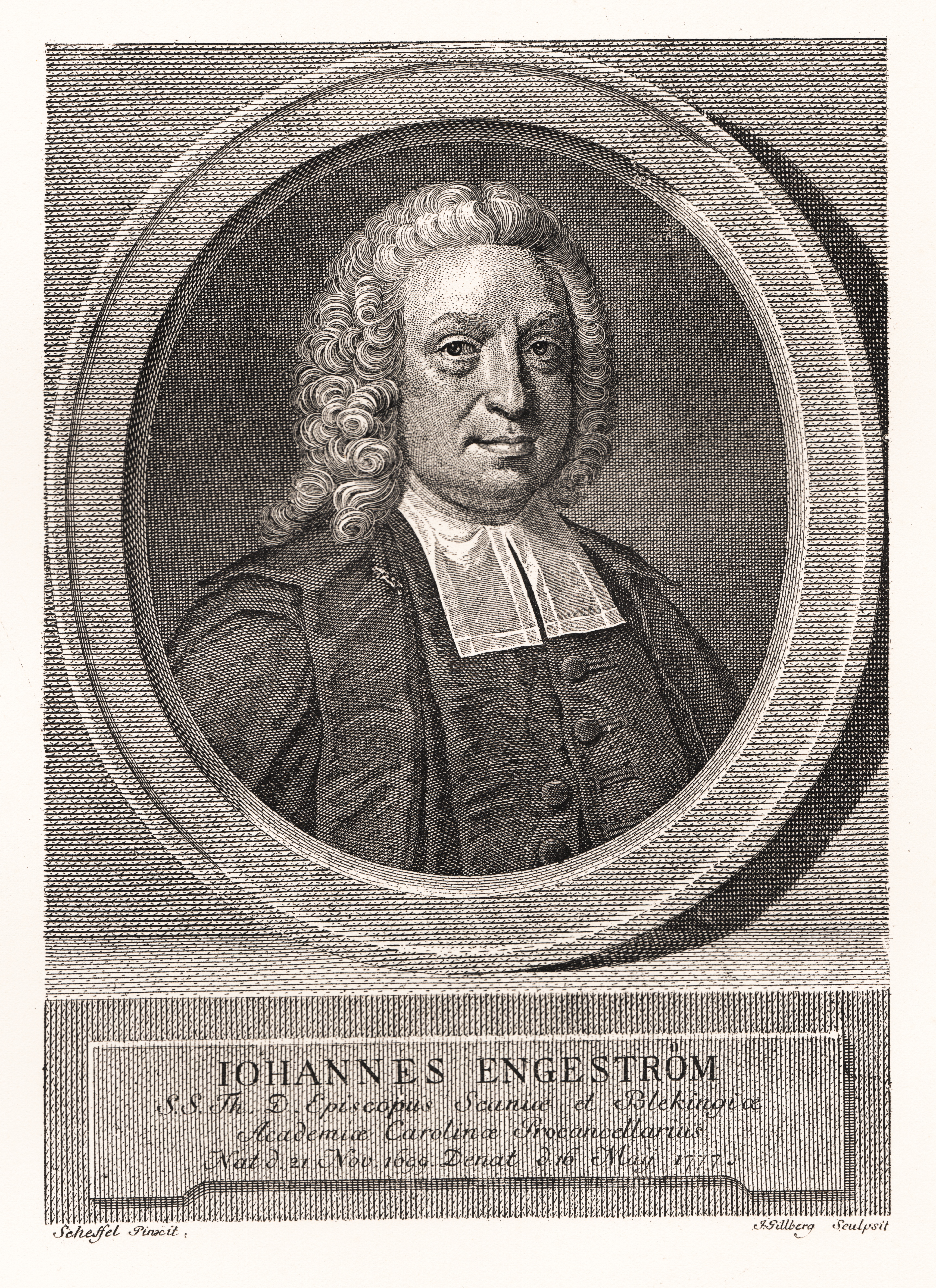 Johan Engeström (1699-1777). Porträttet är en afbildning af J. Gillbergs gravyr, som företer den egendomligheten, att å somliga exemplar angifves J. H. Scheffel hafva utfört originalet, å andra däremot att det är af F. Brander; i öfrigt äro gravyrerna alldeles öfverensstämmande.